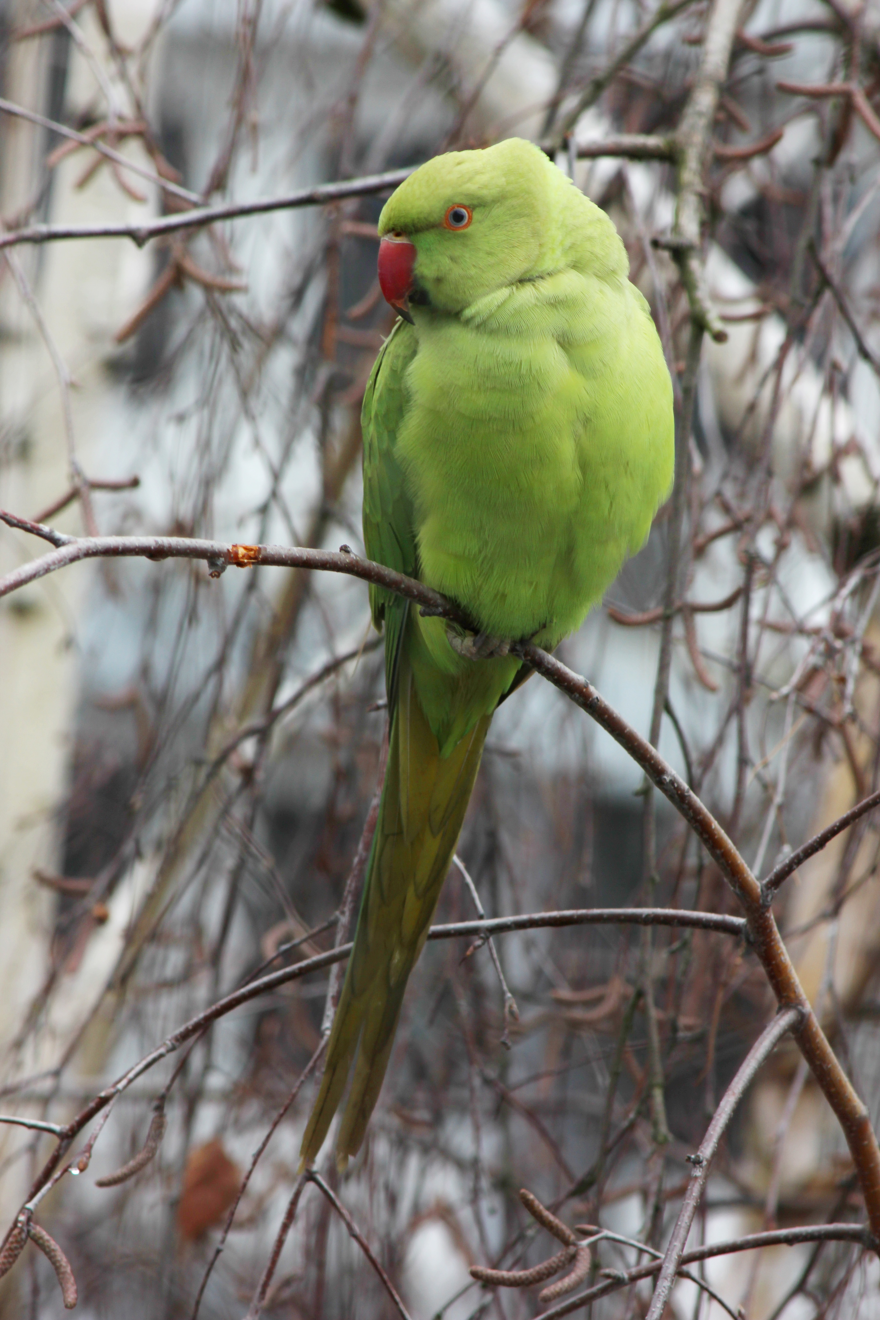 Halsbandsittich in Heidelberg im Januar.